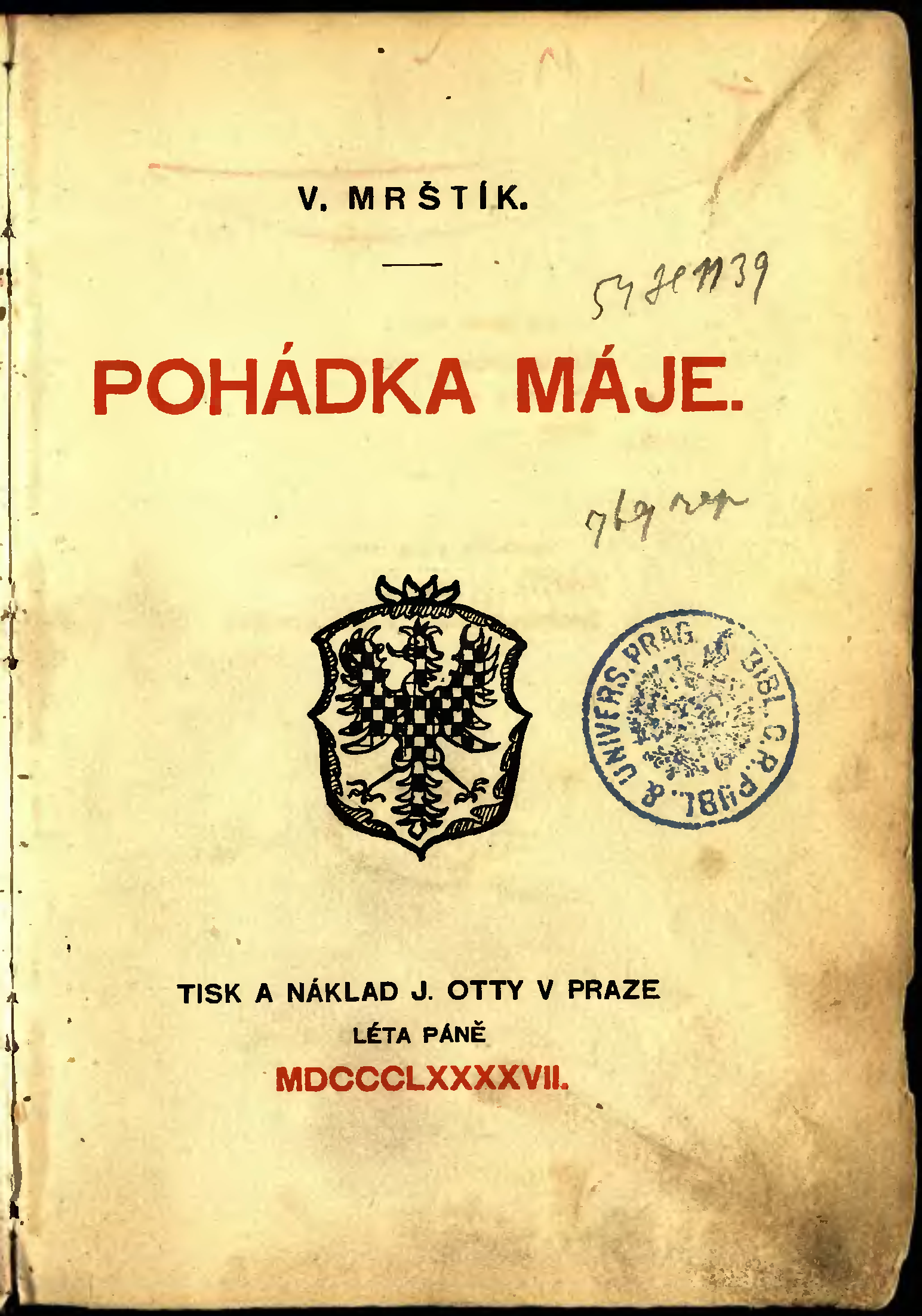 Pohádka máje, vydání 1897, titulní strana